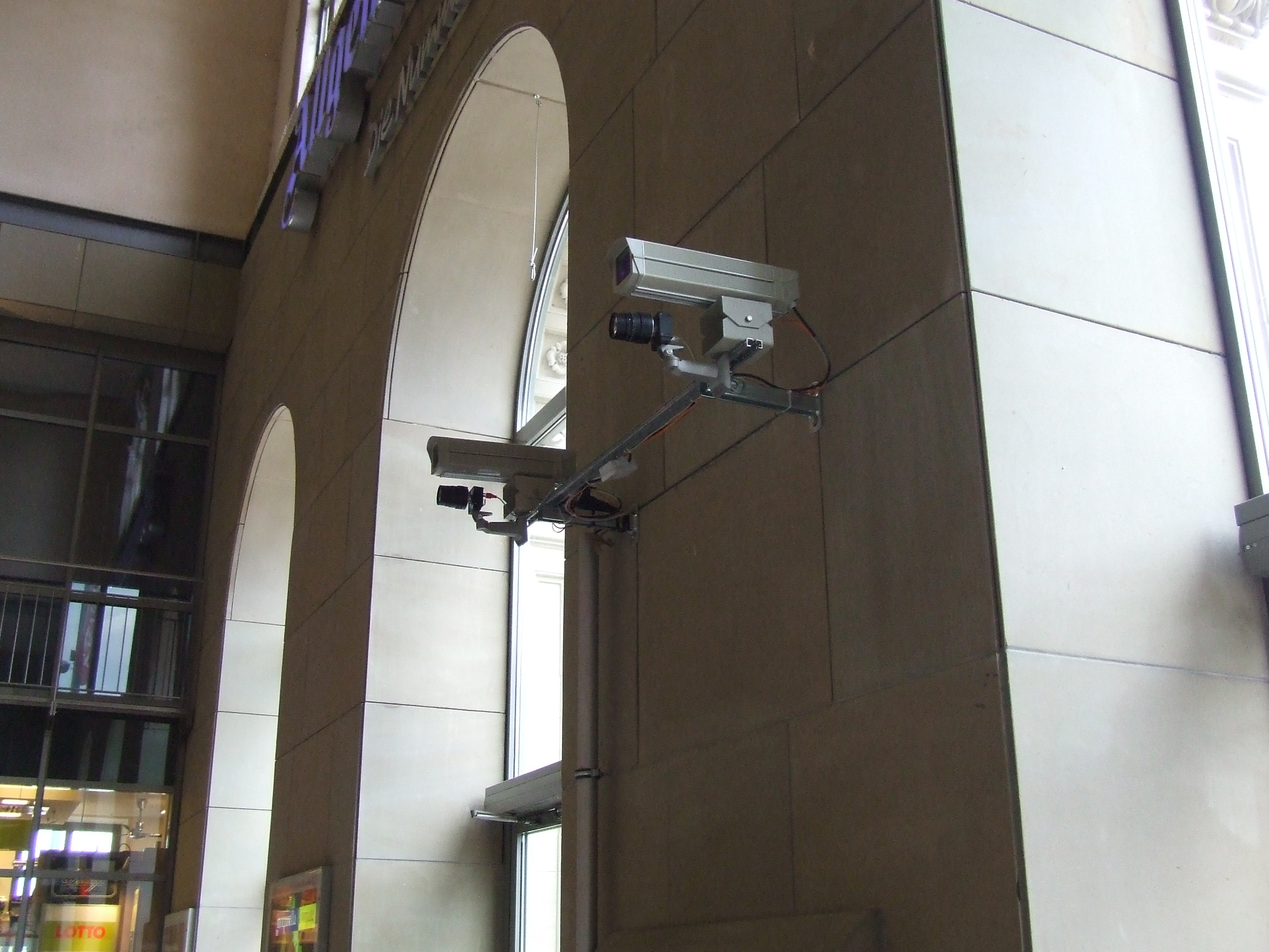 Mainz Hauptbahnhof in Mainz. Central Station, Mainz, Germany. Hier die Test-Videokameras zur Personenkontrolle des BKA